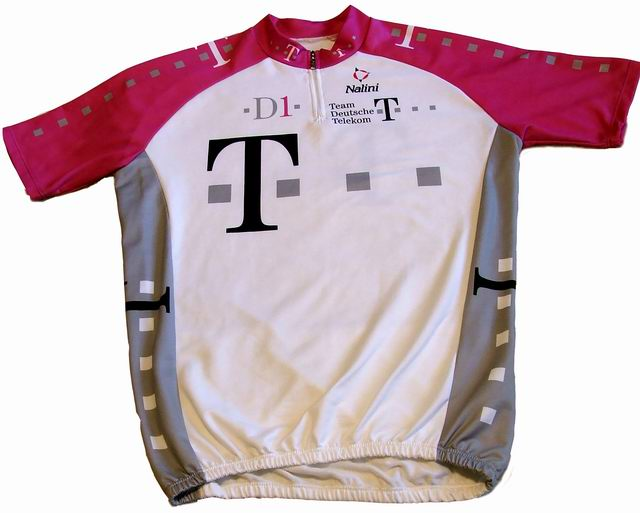 Koszulka kolarska grupy Team Deutsche Telekom